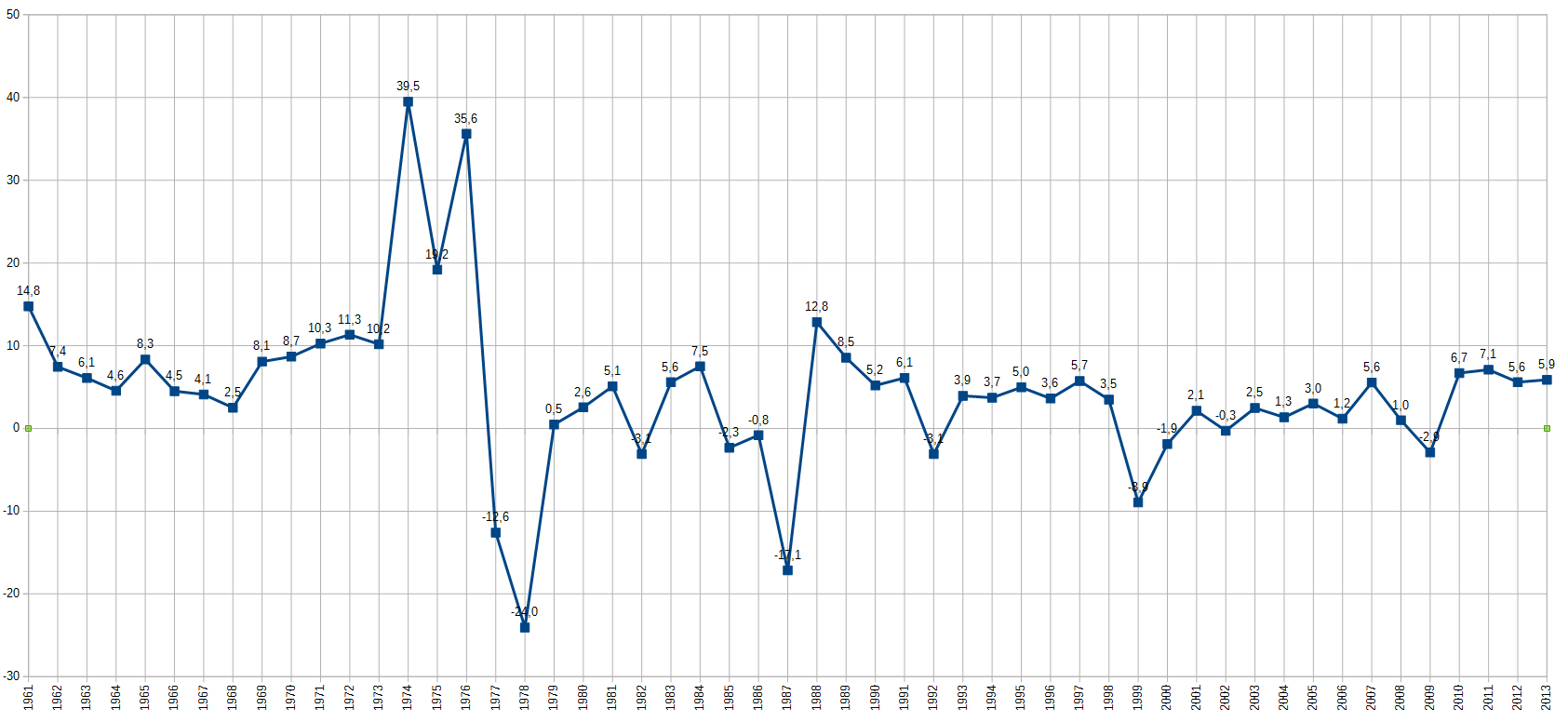 Variations du PIB du Gabon, 1961 2013 source Banque Mondiale